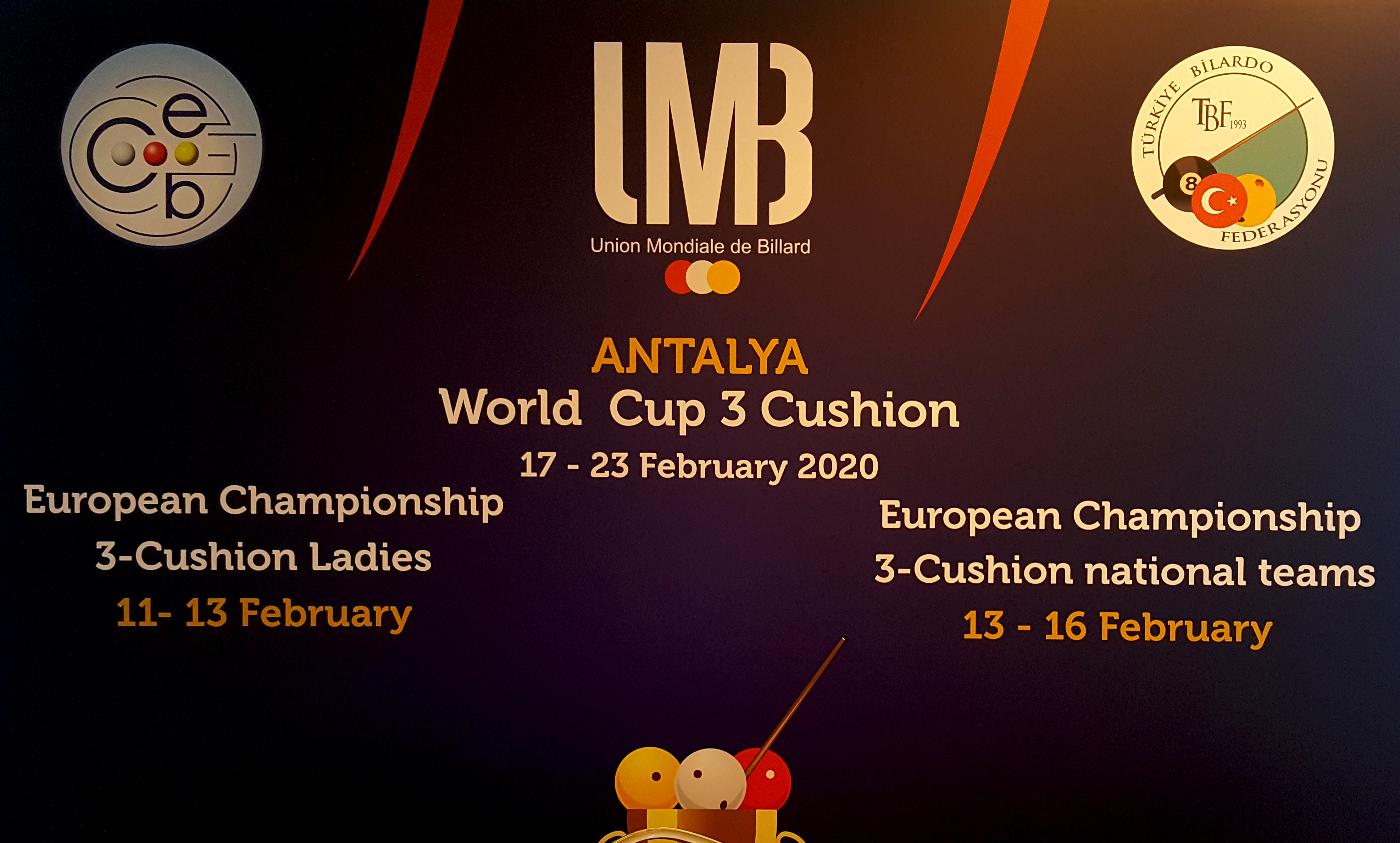 Veranstaltungsplakat der Dreiband-Team-EM/Damen-EM/Dreiband-Weltcup 2020/1 in Antalya